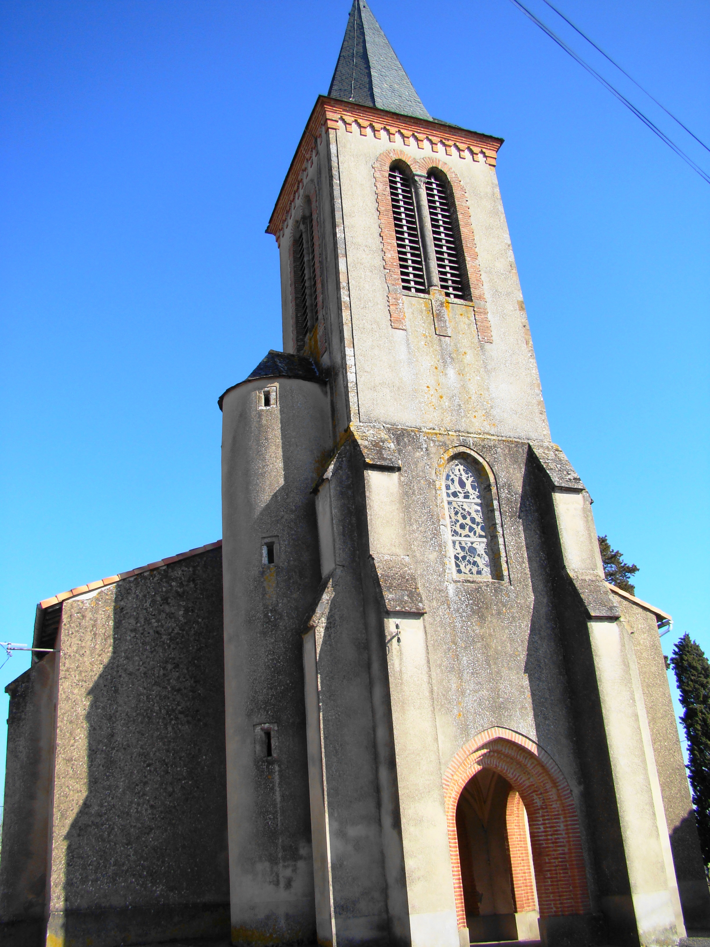 Eglise Notre-Dame